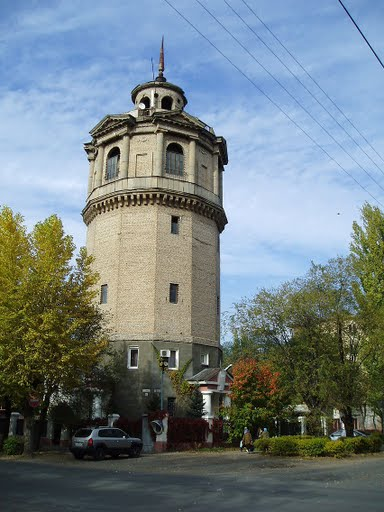 Водонапорная башня, г.Волжский, Волгоградская обл. В этом здании расположено ЗАО "Старая Башня", генеральный директор Крюков Евгений Иванович.